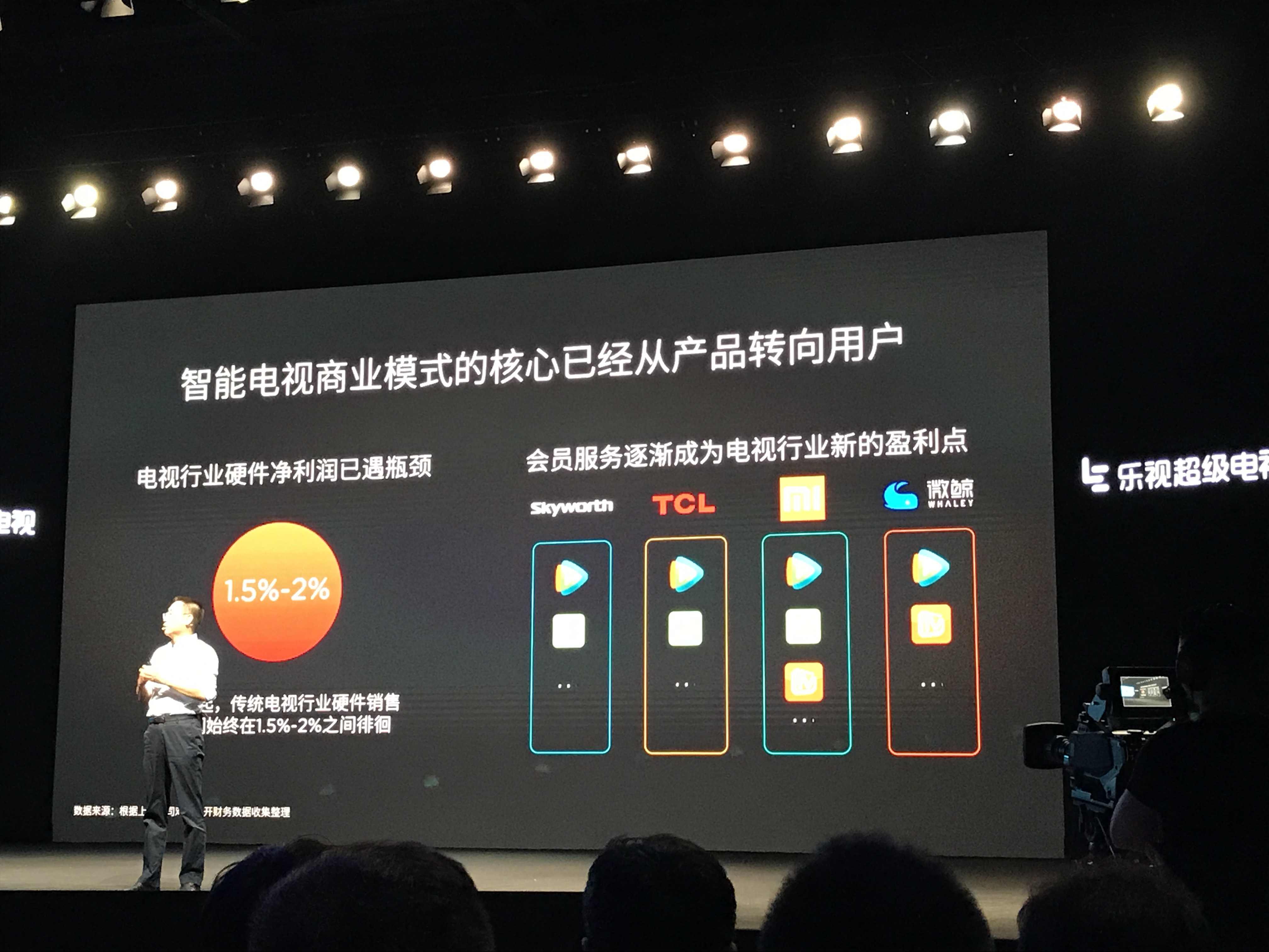 乐视致新总裁梁军，乐视电视4周年发布会